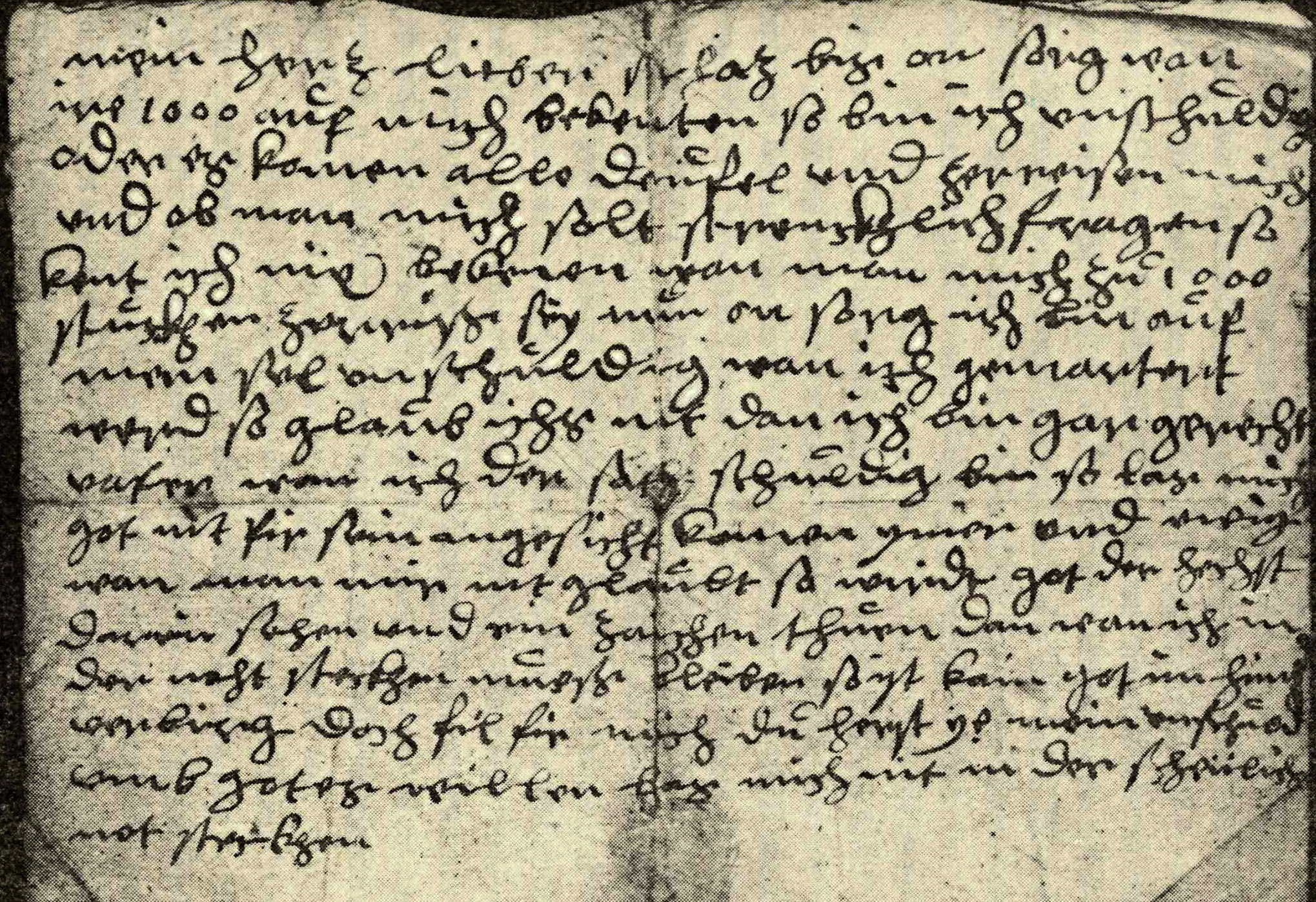 Dokument im Hexenprozess gegen Rebekka Lemp 1590 in Nördlingen. Brief von Rebekka Lemp an ihren Ehemann Peter Lemp ca. vom 10. Juli 1590.